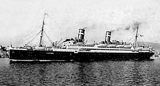 Il piroscafo Conte Rosso in uscita dal porto di Napoli